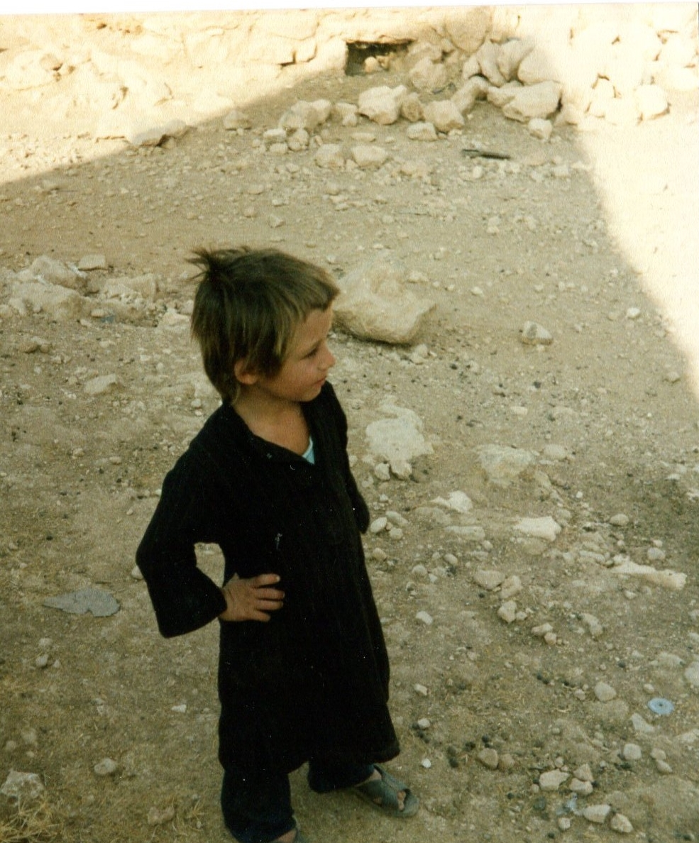 Ein mittelblondes drusisches Kind in syrischer Bergwelt